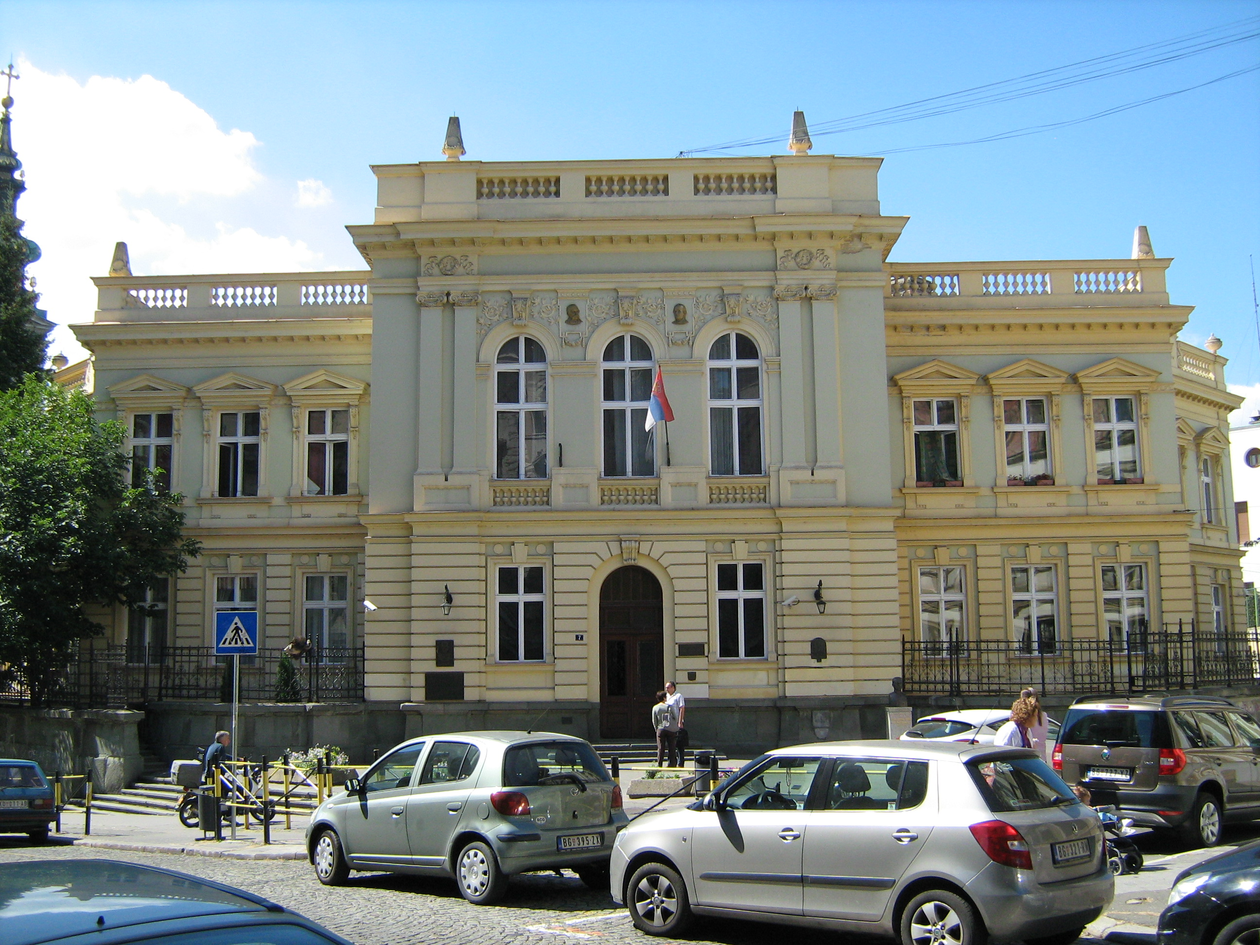 Основна школа краљ Петар Први, Београд